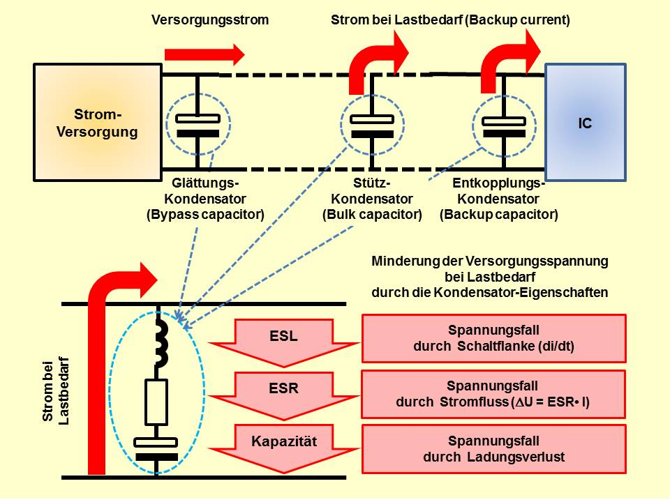 Einfluss elektrischer Parameter von Kondensatoren bei Laständerung auf die Versorgungsspannung